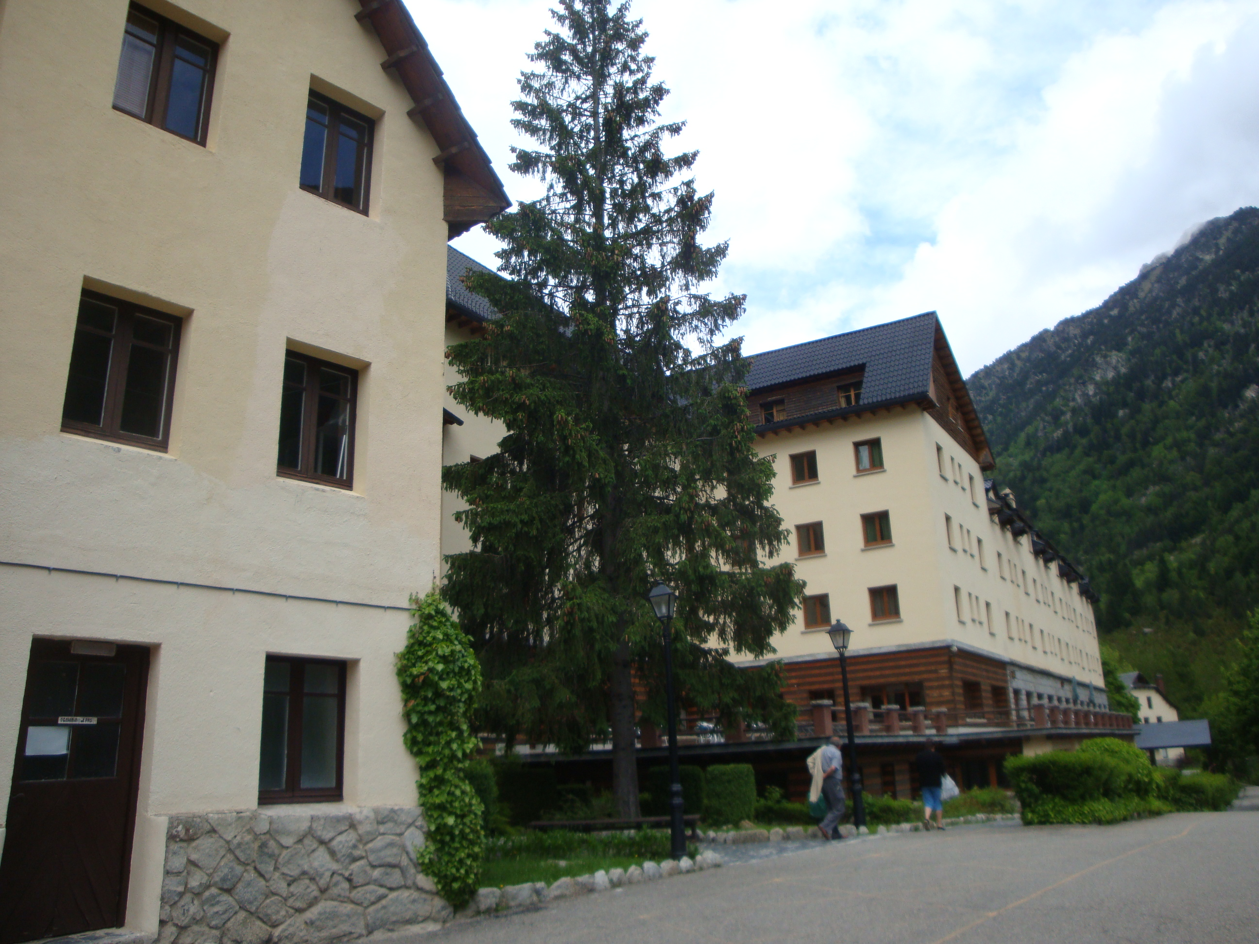 Balneario de Caldes de Boi (Lleida) (España)